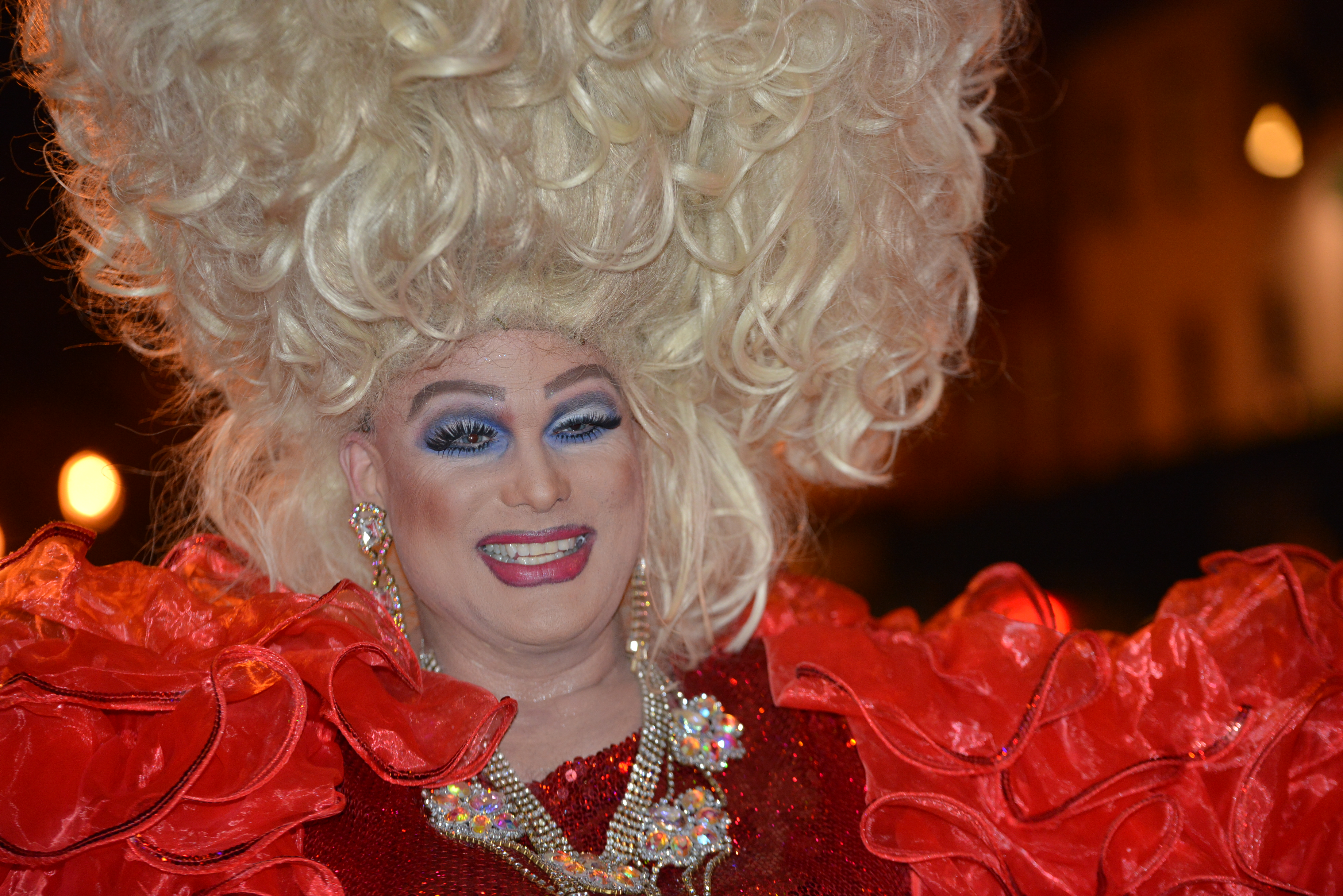 DC High Heel Drag Queen Race 2014